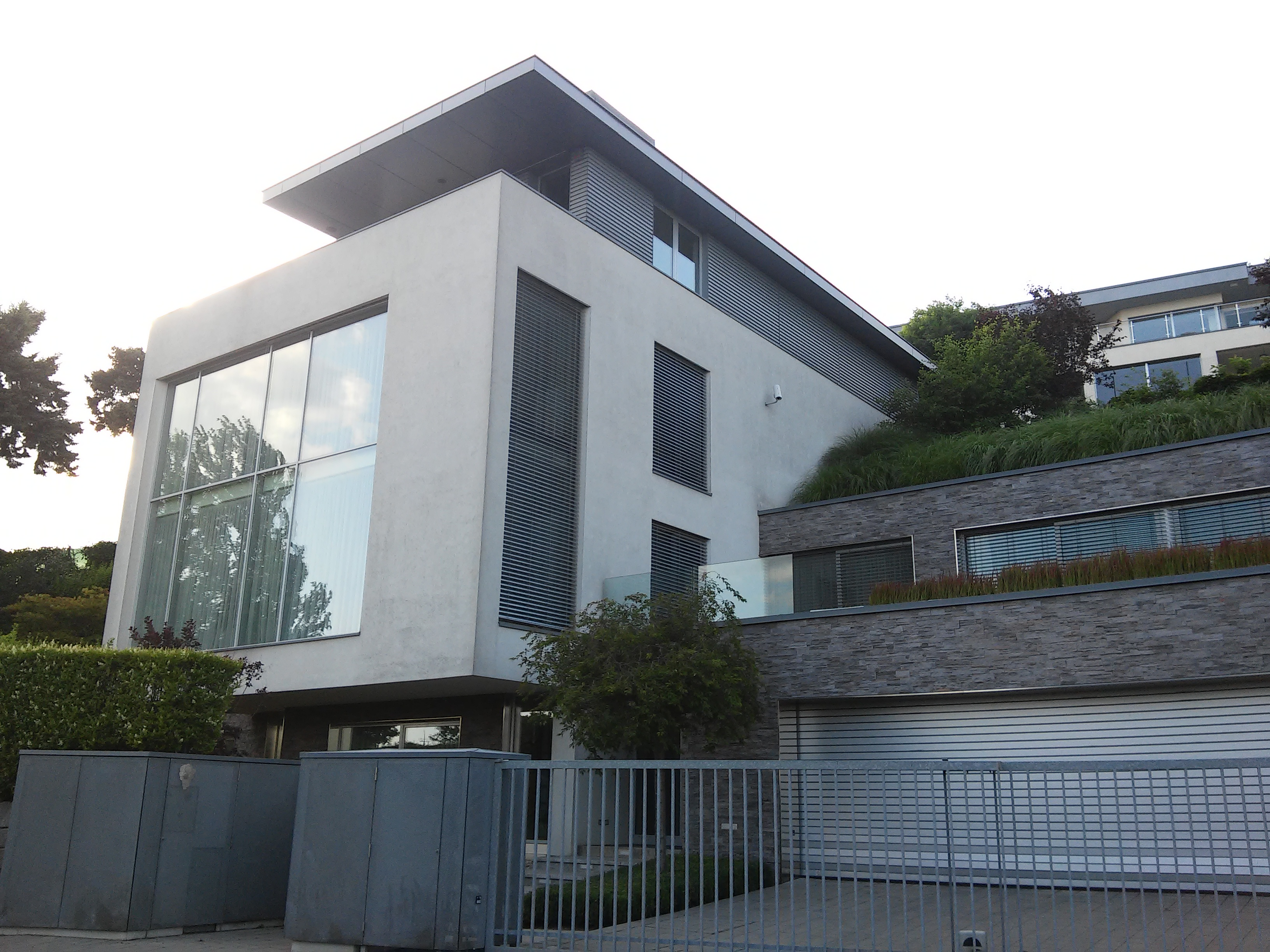 Stará Vinárska, Staré Mesto, Bratislava